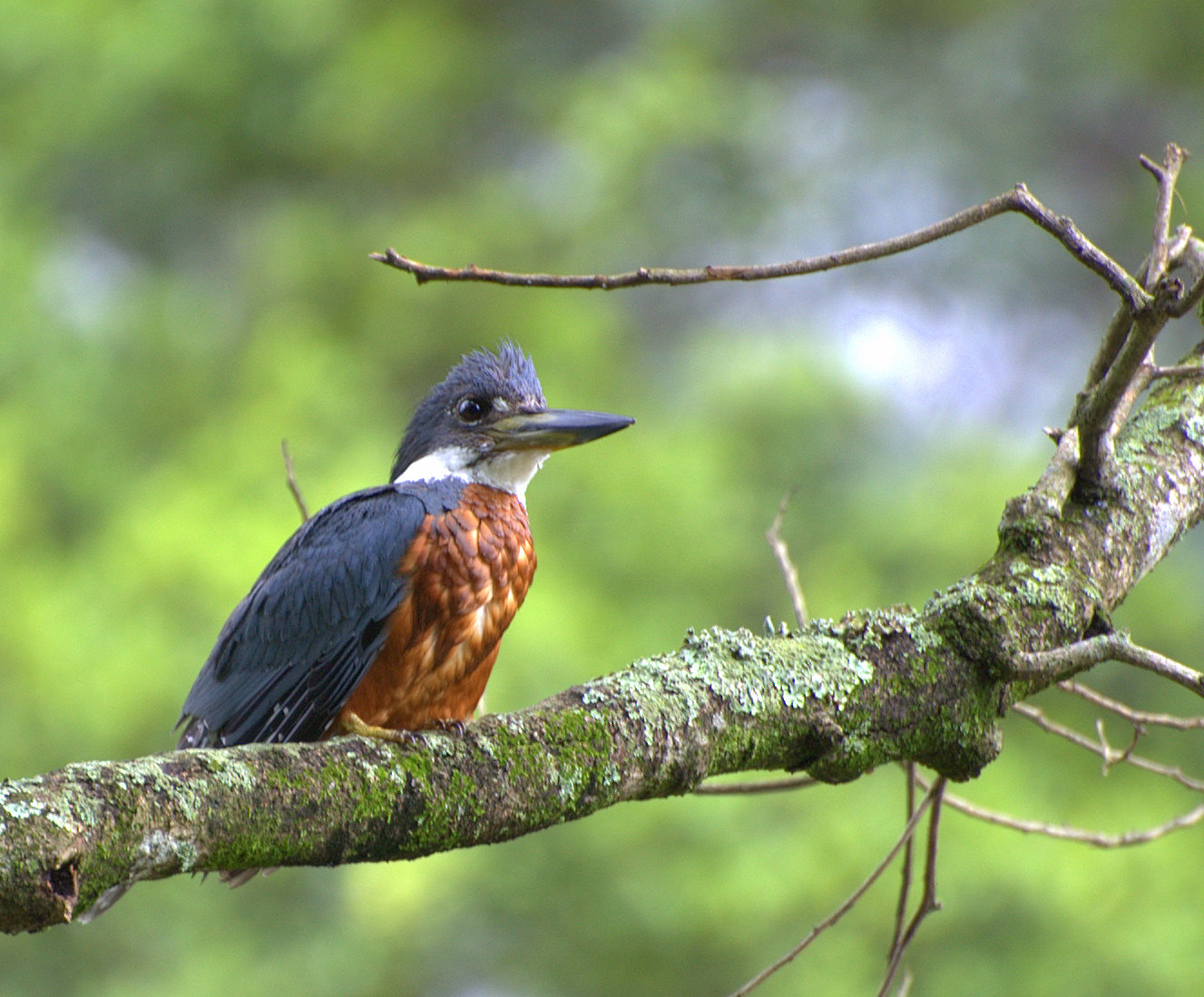 Megaceryle torquata, Horto Florestal de São Paulo